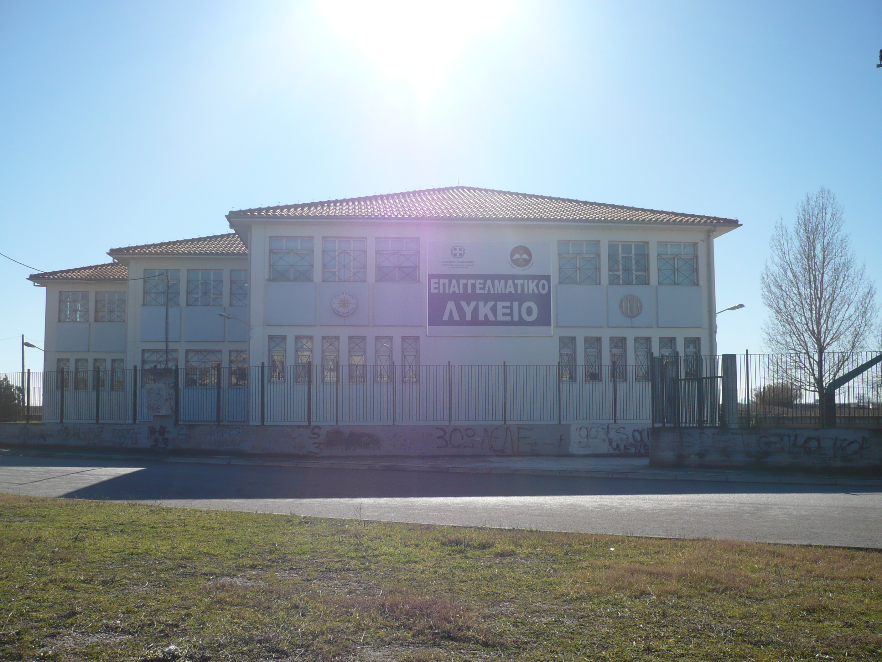 Επαγγελματικό